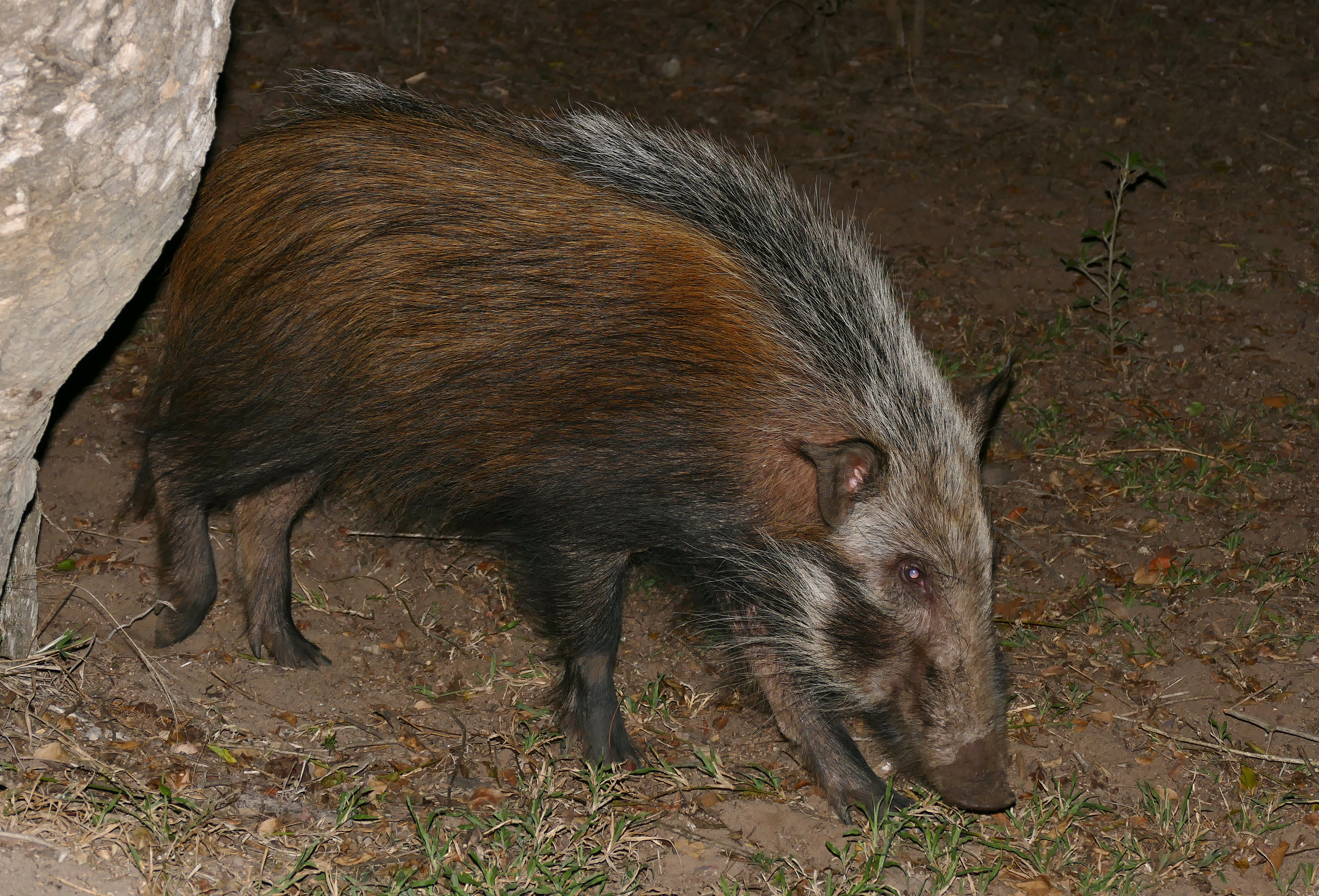 Mpila Camp, iMfolozi Game Reserve, Hluhluwe-iMfolozi Park, Kwazulu-Natal, SOUTH AFRICA